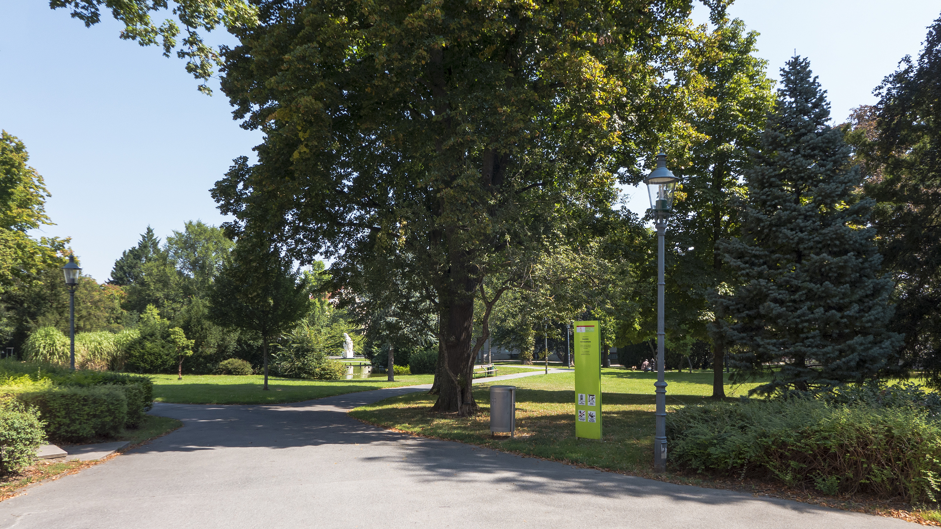 Maurer Rathauspark in Wien 23